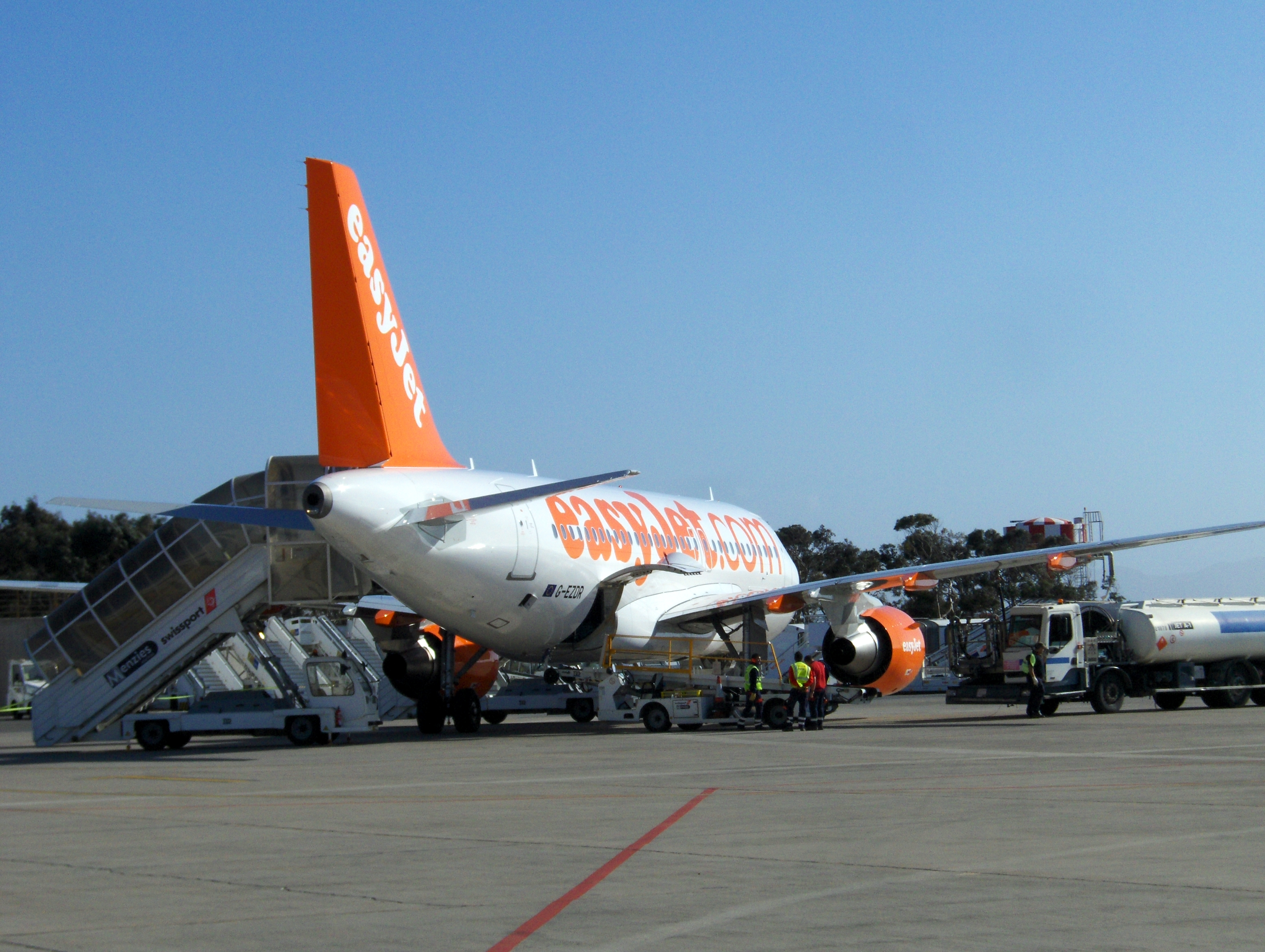 Airbus A319 en el aeropuerto de Almería